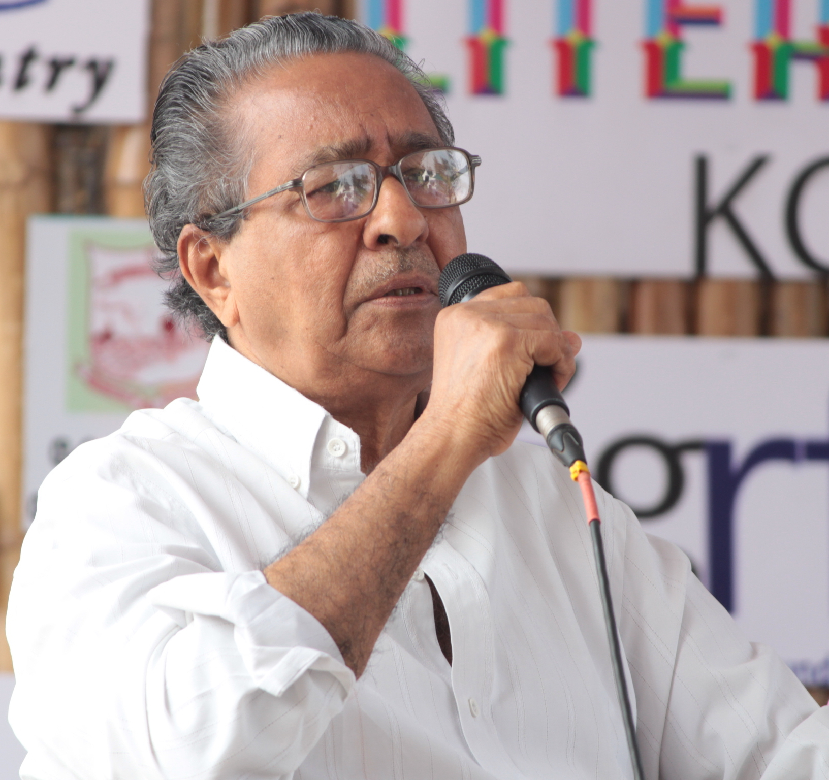 എം.എം ബഷീര്‍ 2017 ഫെബ്രുവരി 5ന് കോഴിക്കോട് നടന്ന ലിറ്ററേച്ചര്‍ ഫെസ്റ്റിവലില്‍